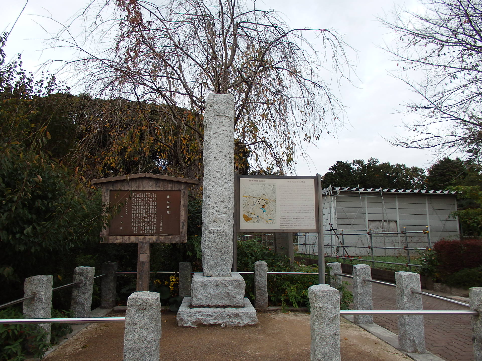 赤山城址の碑